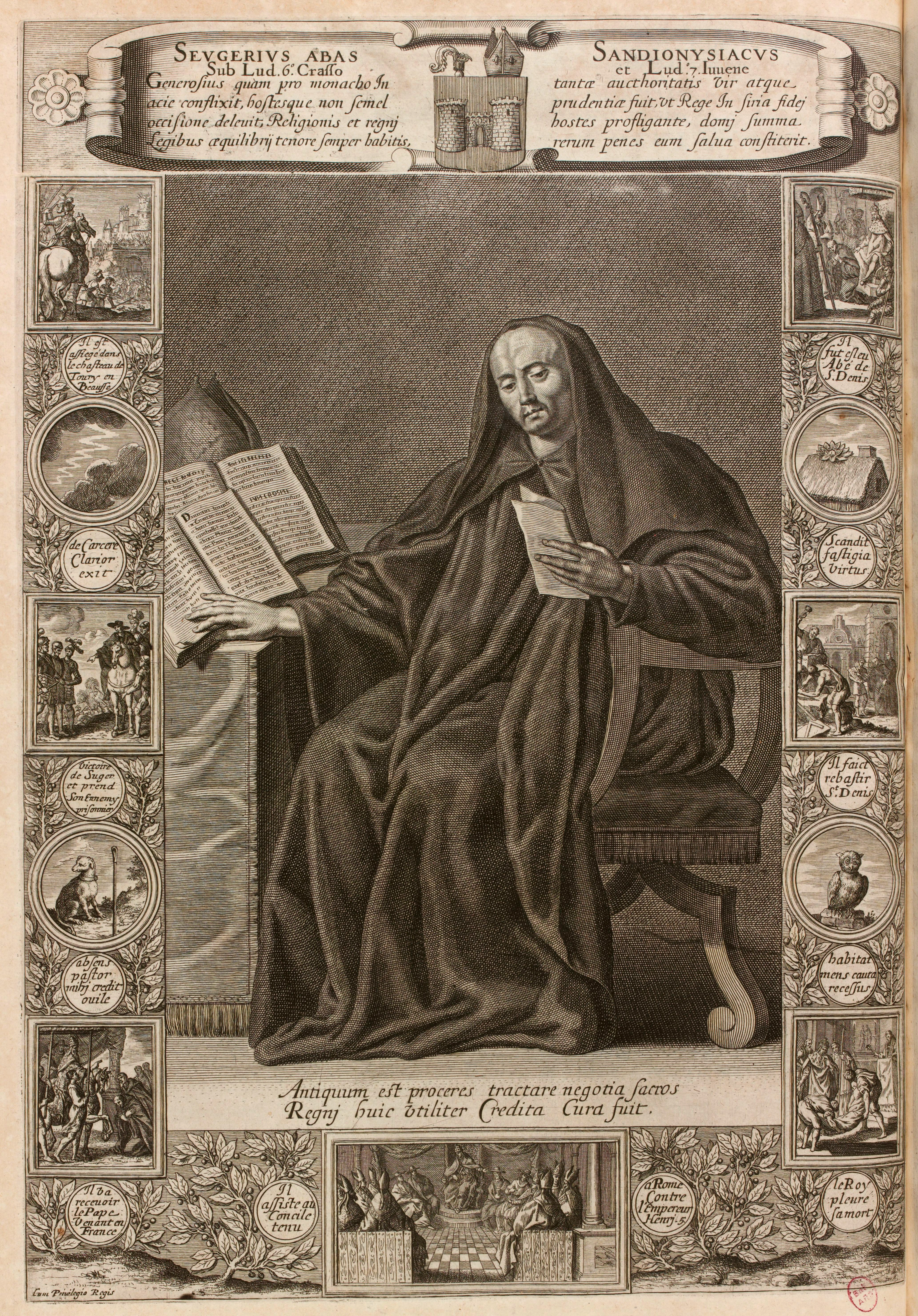 L'Abbé Suger, gravure publiée dans Les hommes illustres et grands capitaines françois qui sont peints dans la galerie du Palais Royal. Ensemble un abrégé de leurs vies & actions memorables de Marc de Vulson de La Colombière. 1690. Dessin et graveur : Zacharie Heinse et François Bignon